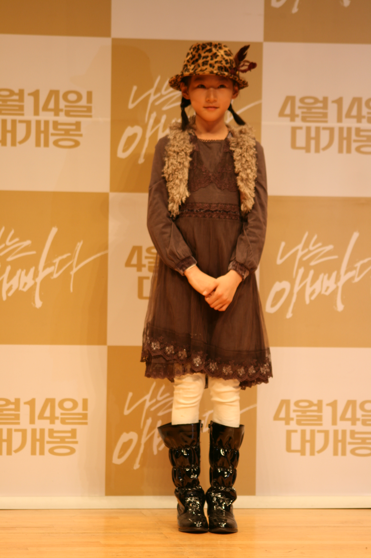 나는 아빠다 언론시사회